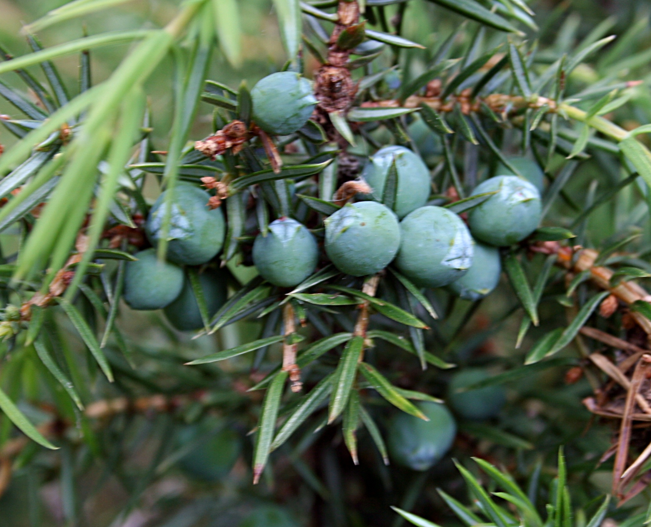 Owoce jałowca